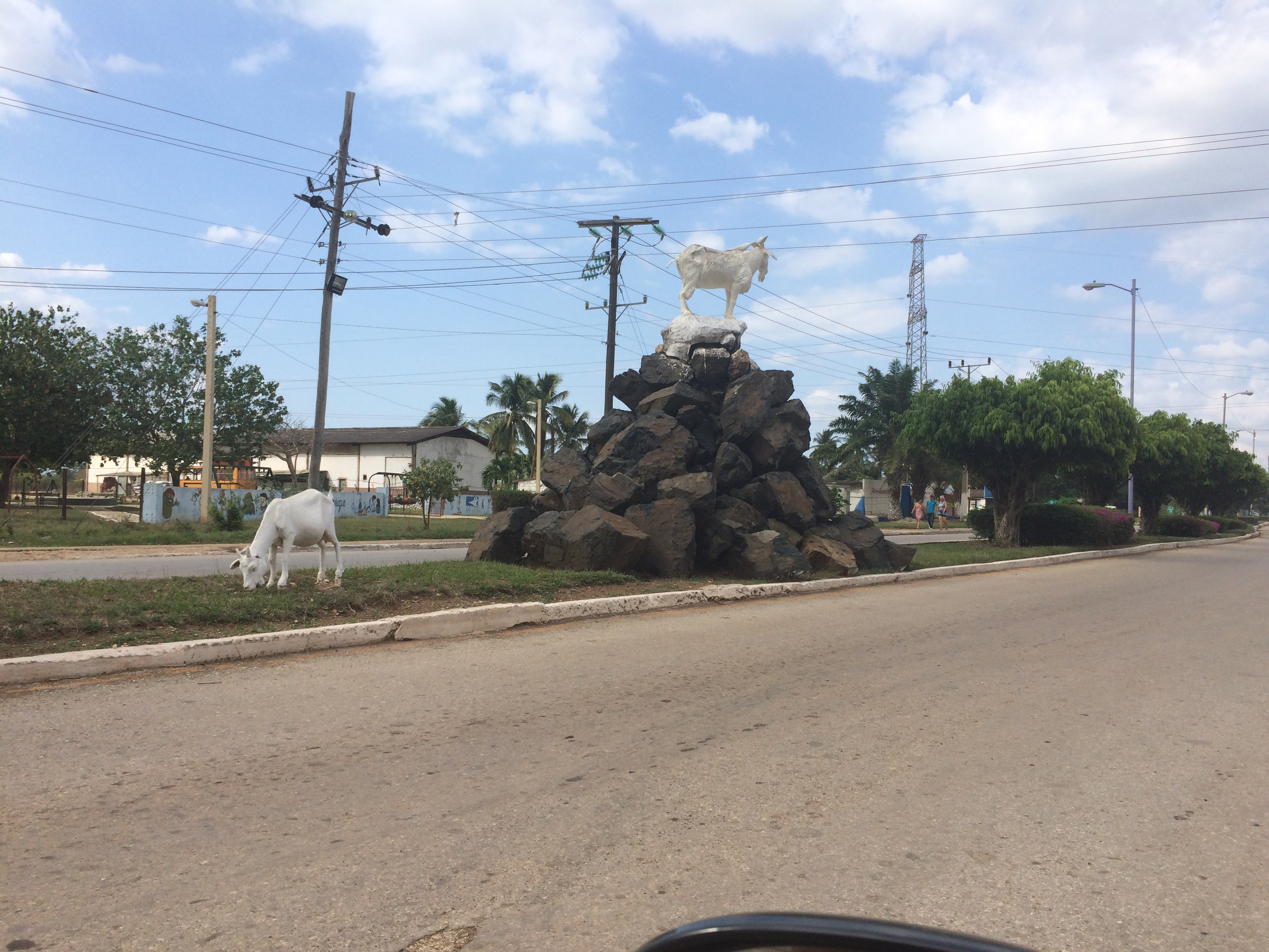 Gaspar, Cuba